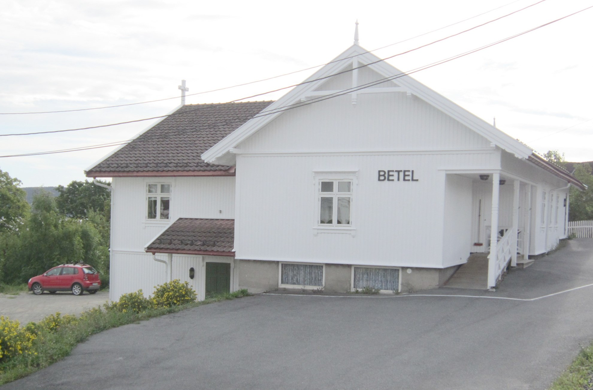 Betel Nærsnes